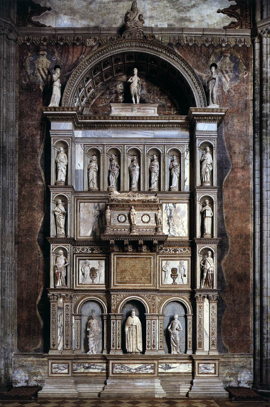 Antonio Rizzo, Monumento Tron Basilica Frari, Venezia